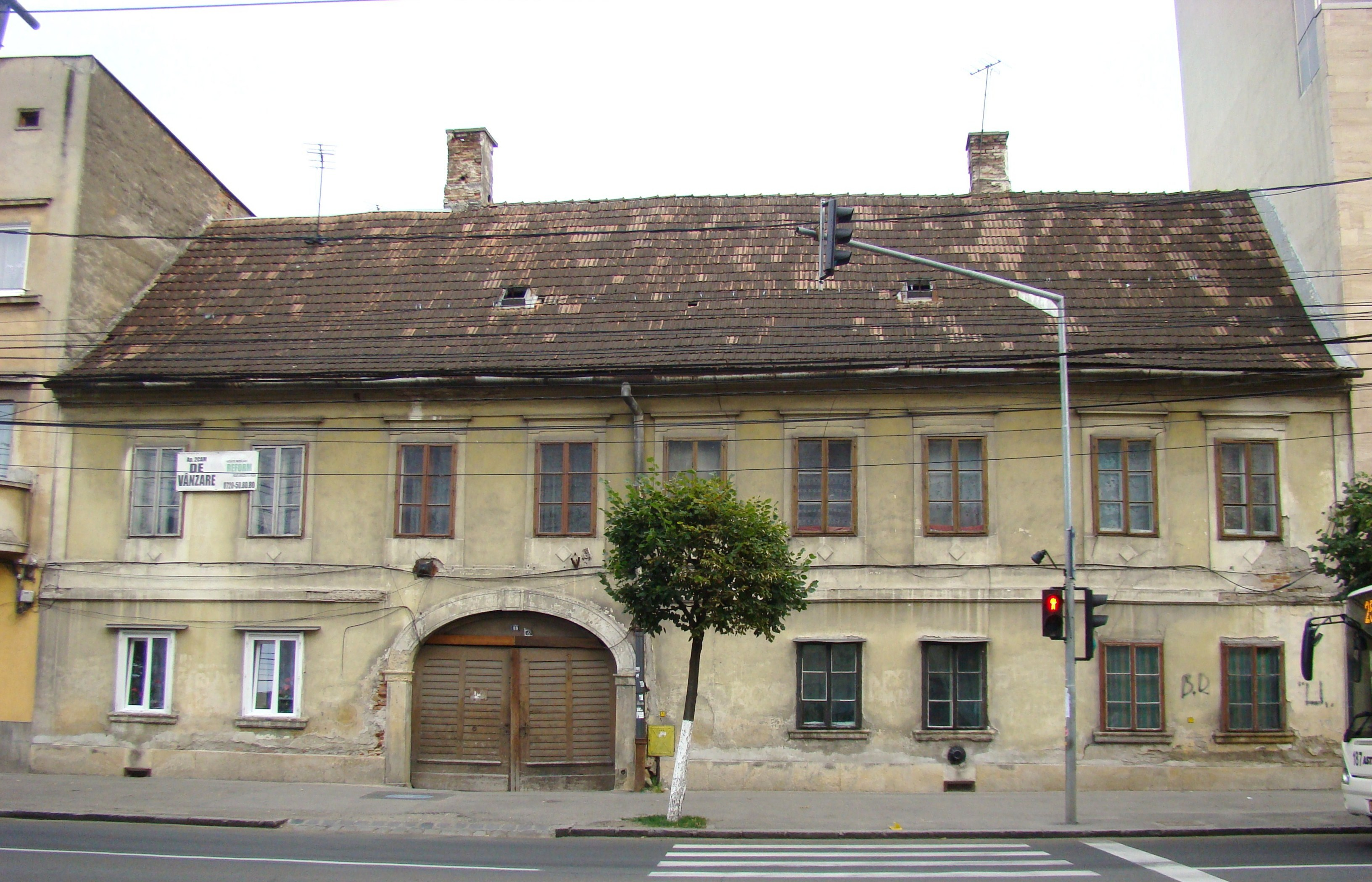 Clădire monument istoric, Calea Moților, nr. 69